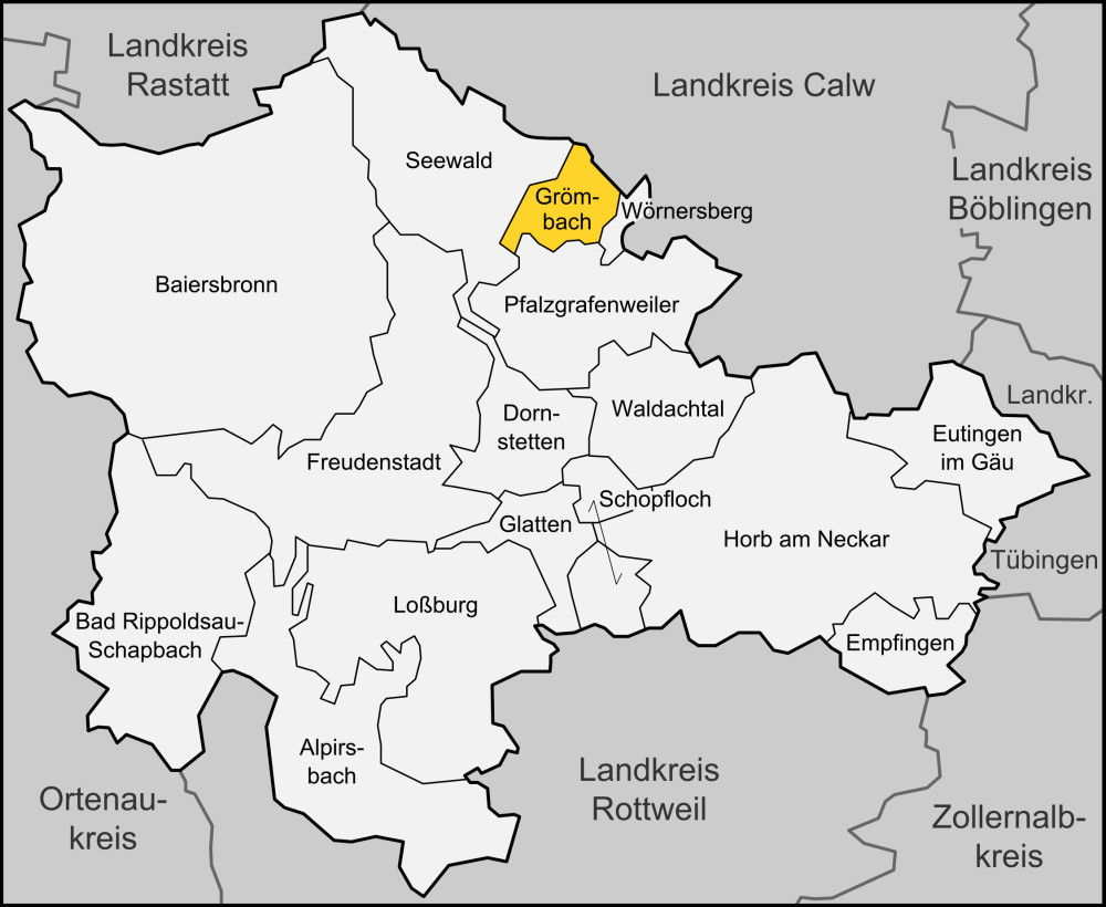 Karte der Gemeinde Grömbach im Landkreises Freudenstadt